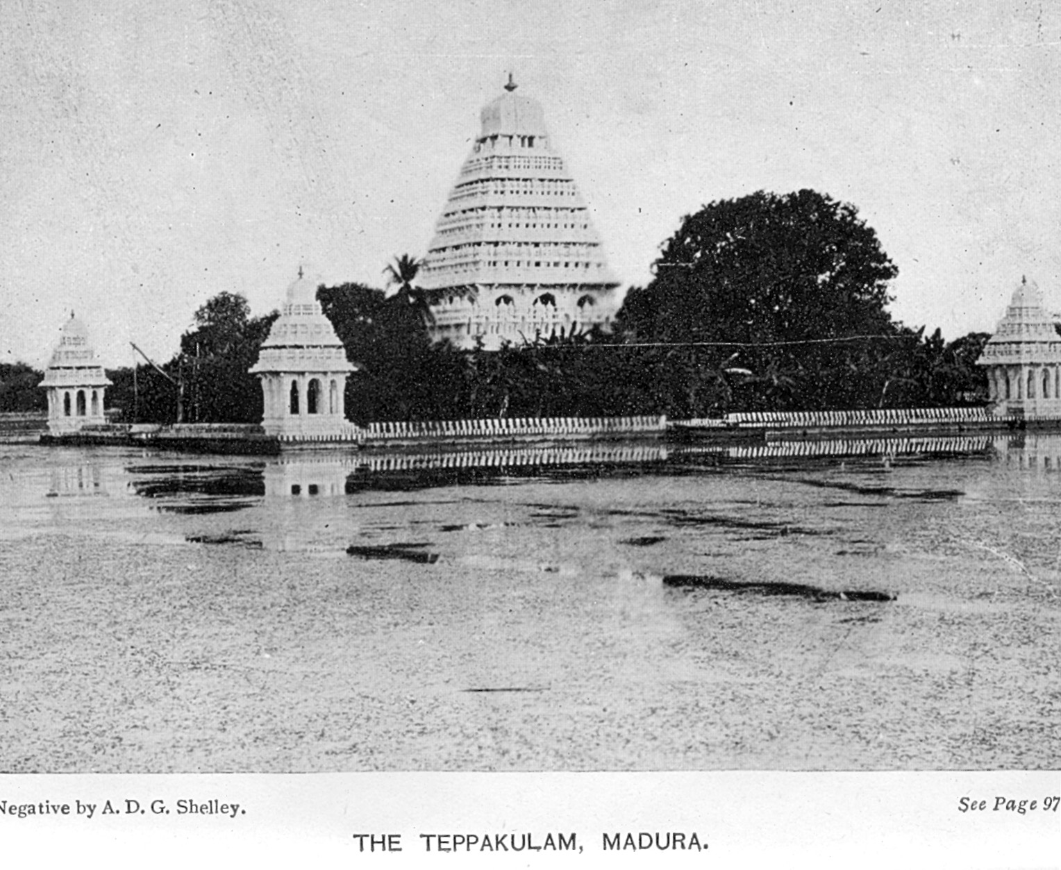 Madura Teppakulam